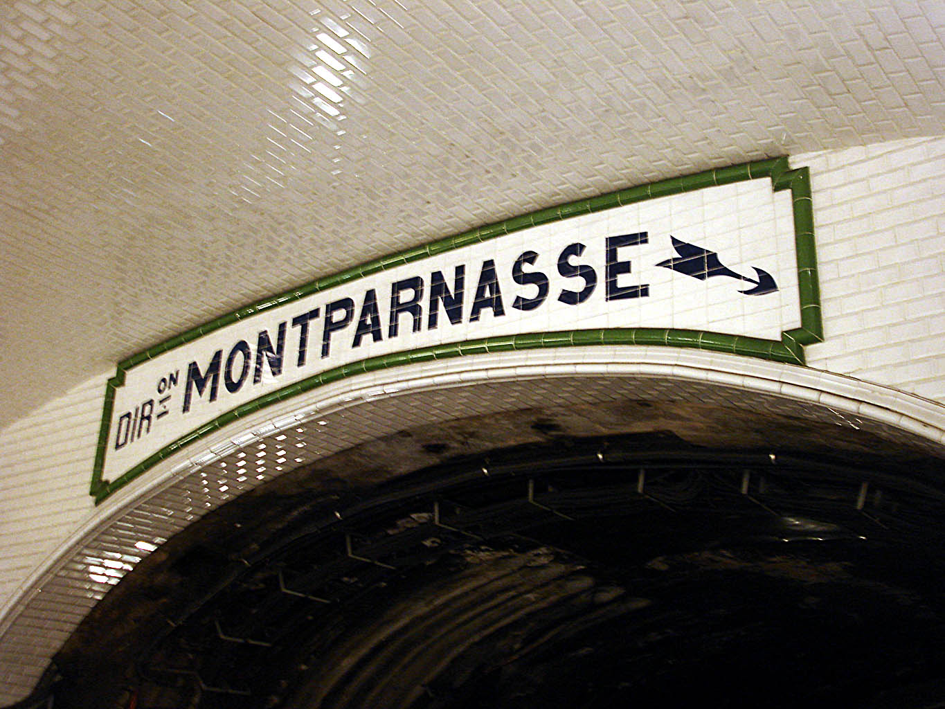 Station Sèvres - Babylone de la ligne 12 du métro de Paris, France.